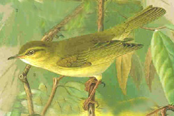 Phylloscopus trochilus en